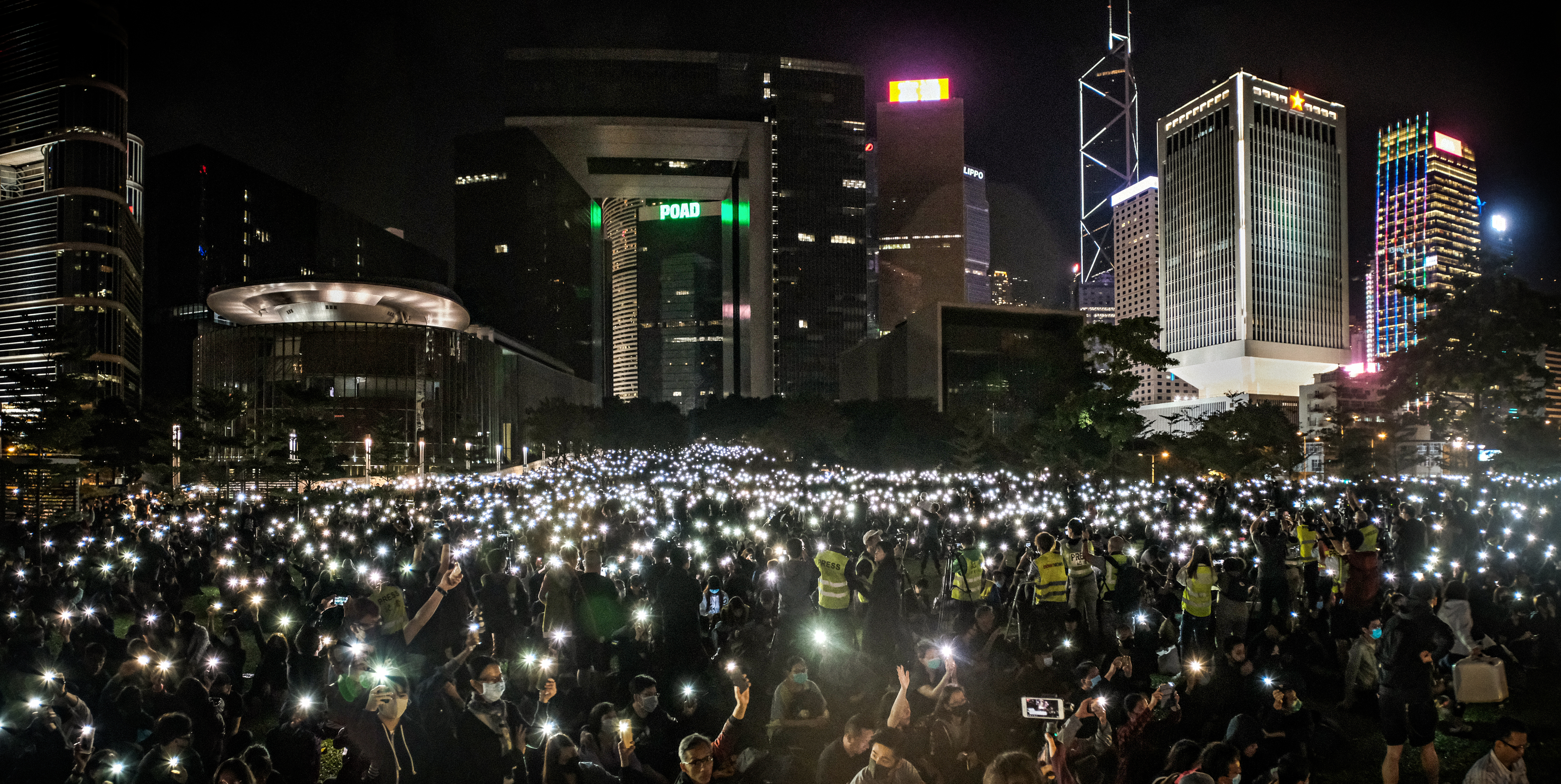 Panorama1